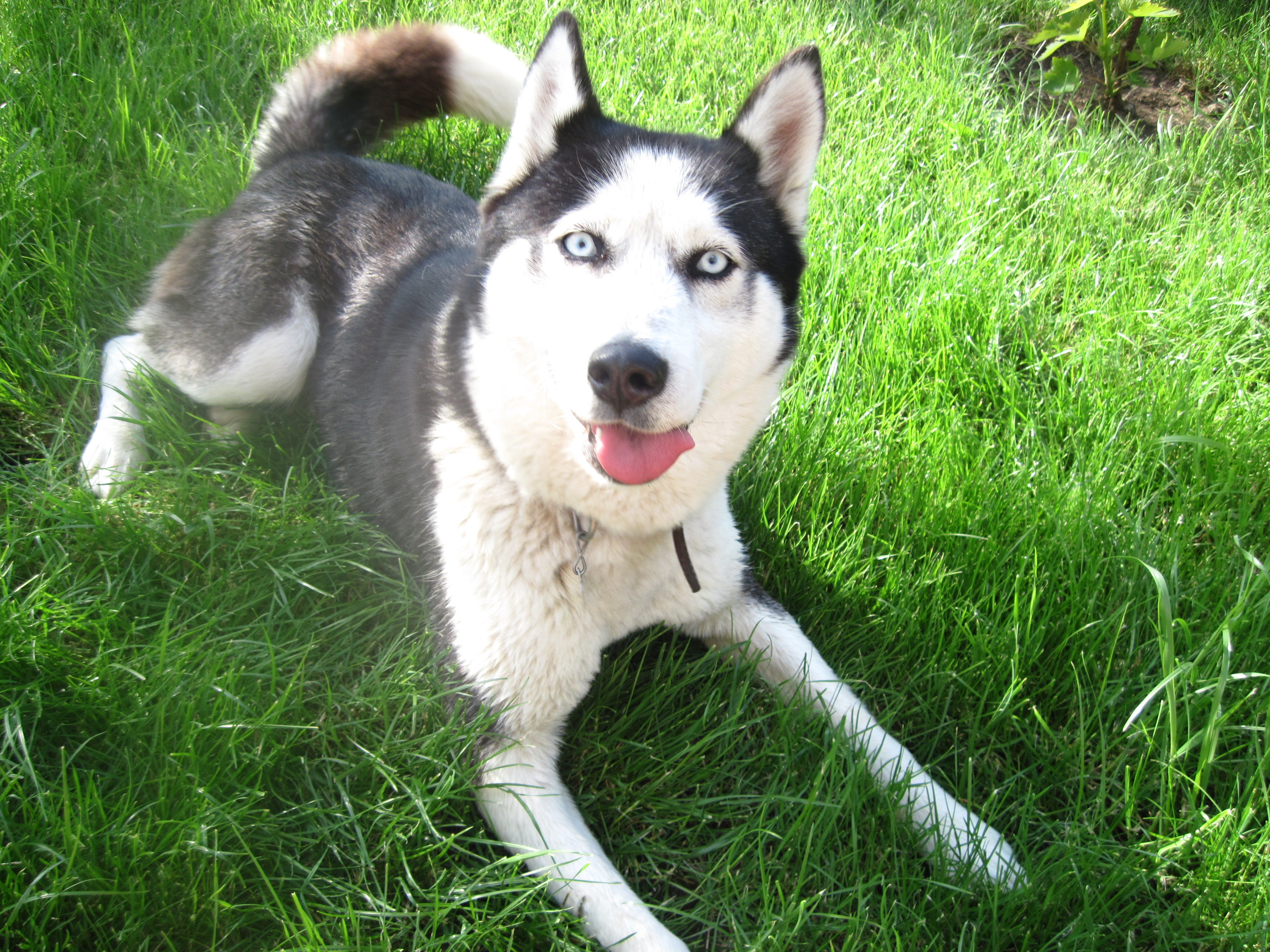 Lora - Husky